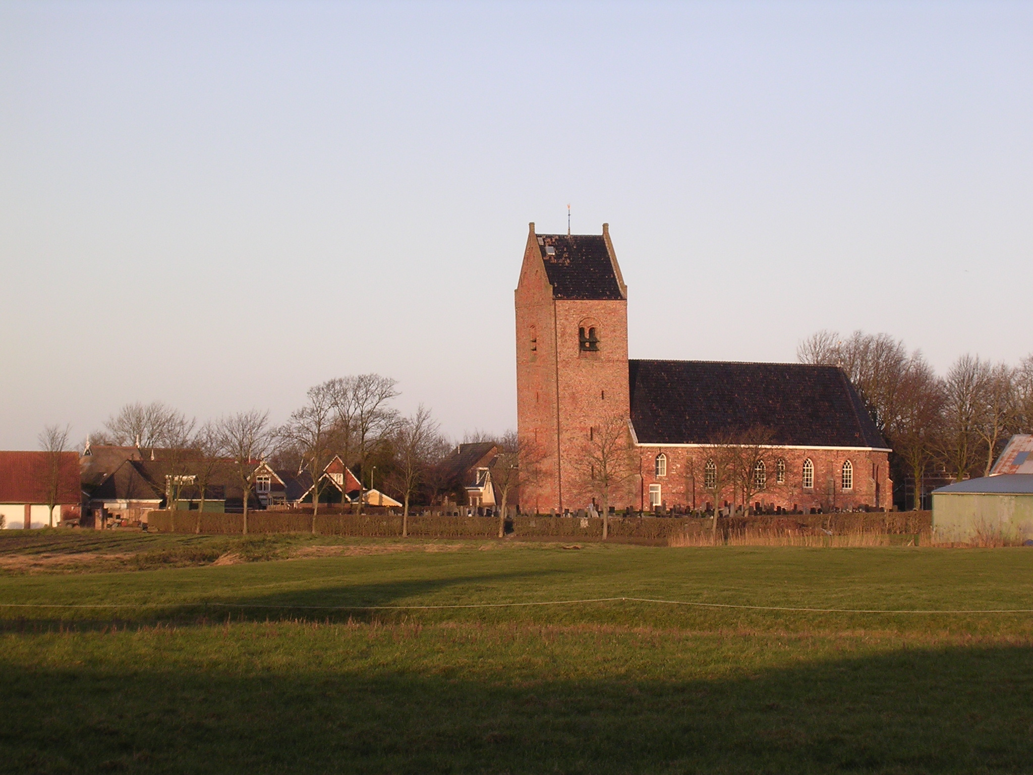 Herfoarme Tsjerke fan Easternijtsjerk (Church of the village Oosternijkerk)